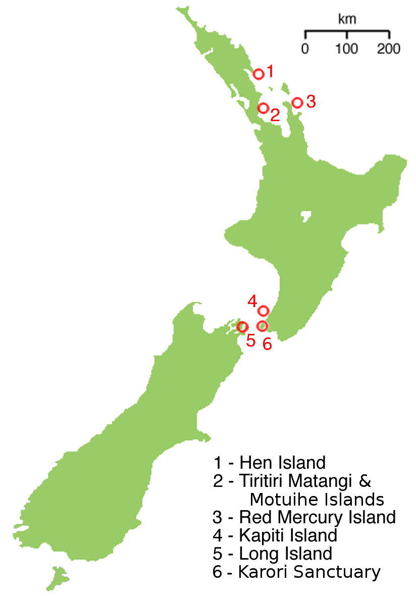 Kivik térképének szétbontása 2